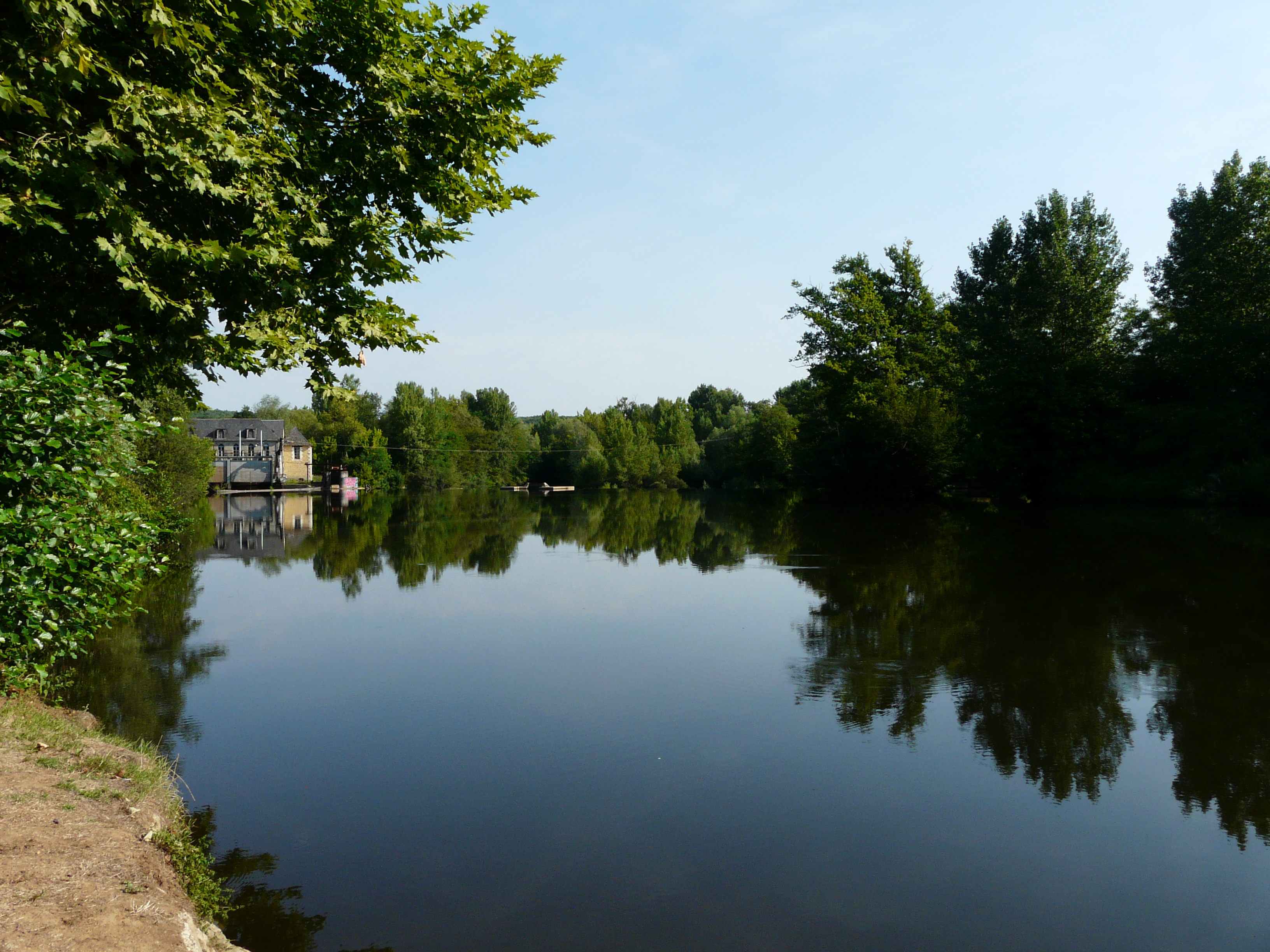 La Vézère au lieu-dit les Escures à Terrasson-Lavilledieu, Dordogne, France. Sur la rive opposée, la commune de Mansac, en Corrèze. Vue prise en direction de l'aval.